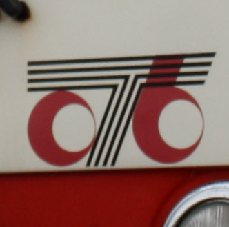 Mercedes-Logo na libré dos Transportes Colectivos do Barreiro.